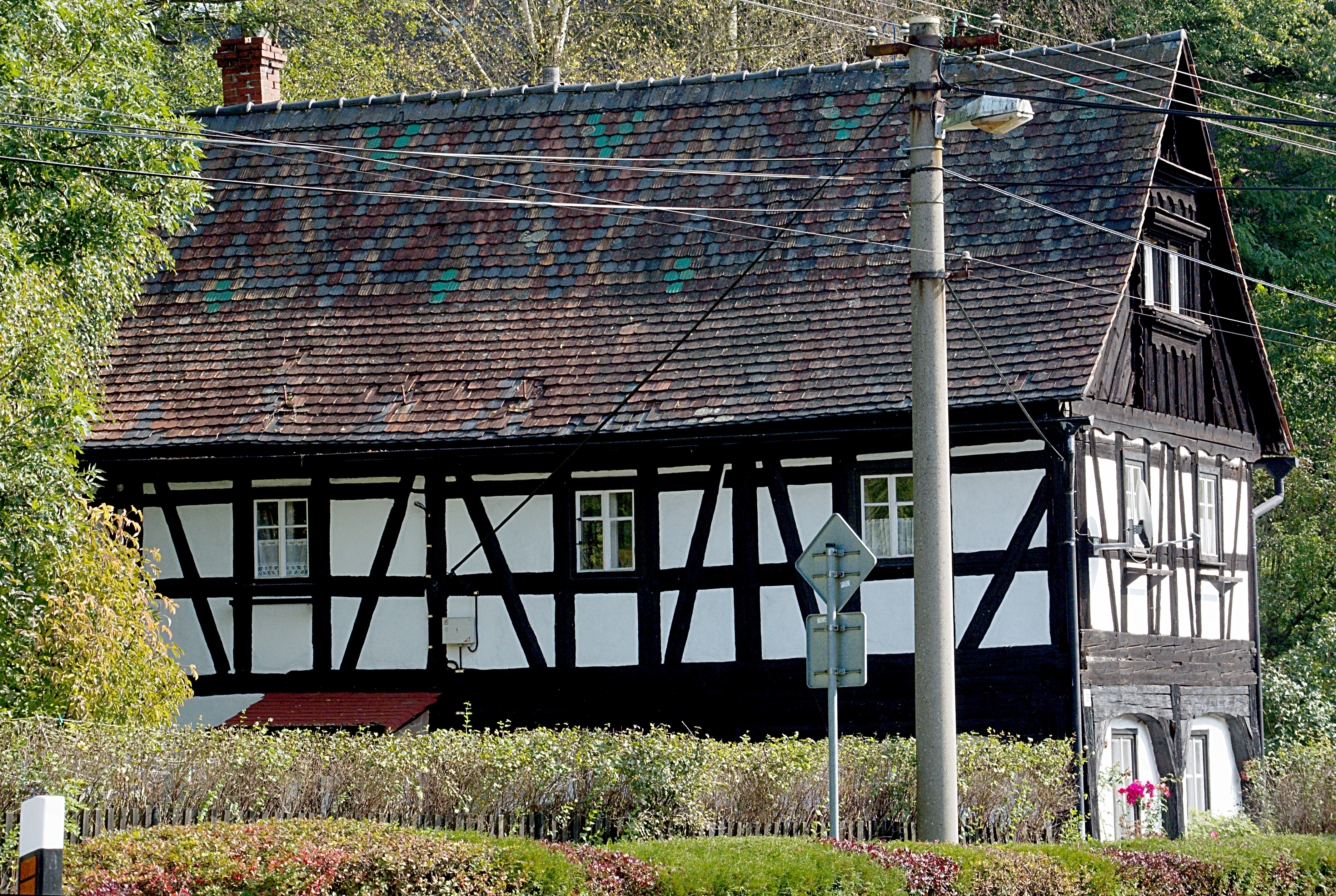 Dům čp. 29, Janovice v Podještědí 29, Janovice v Podještědí.